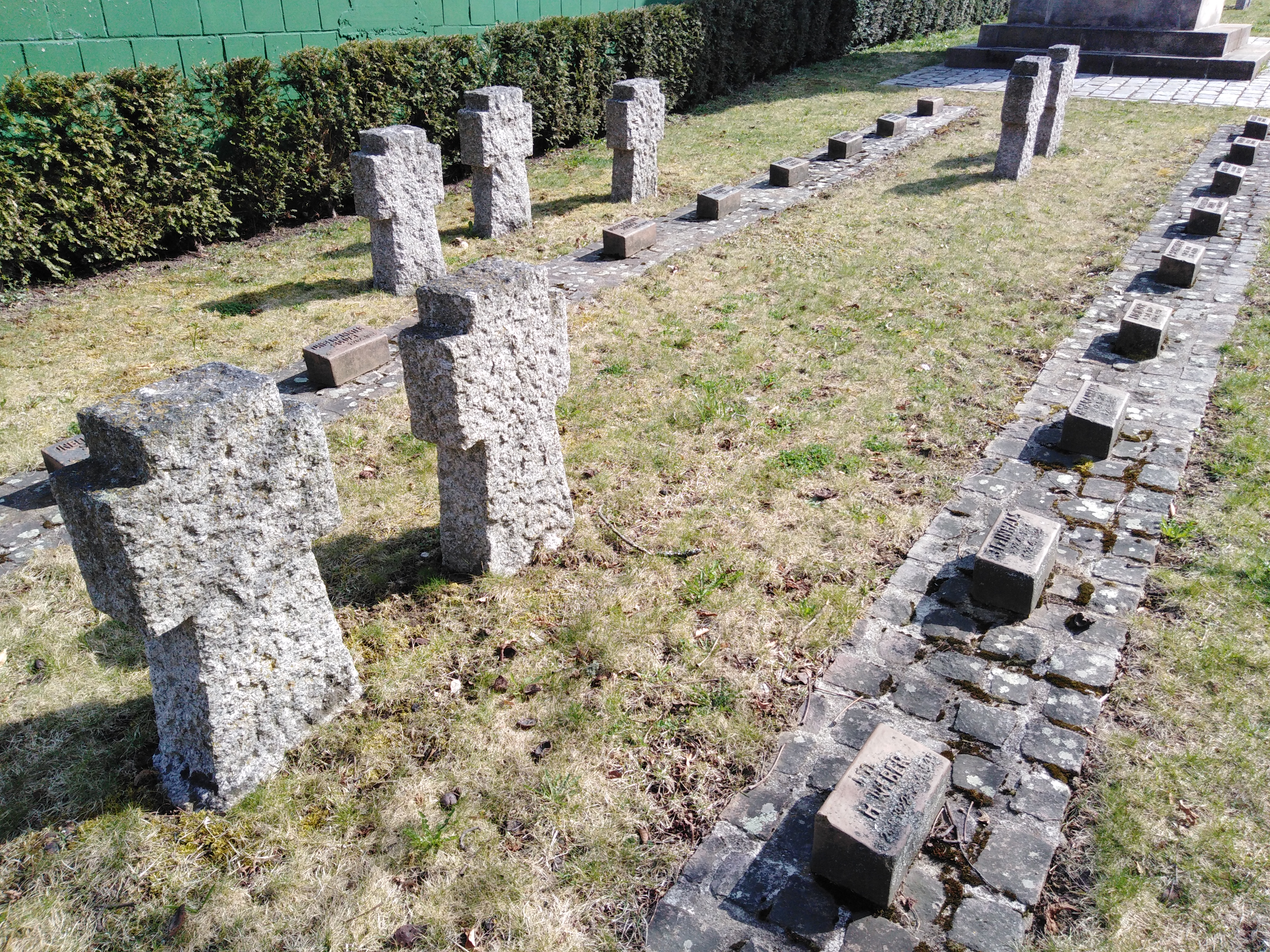 Blumberg, Stadt im Schwarzwald-Baar-Kreis in baden-Württemberg. Der Soldatenfriedhof der Gefallenen der Kämpfe Ende April 1945. Bei der Evangelischen Kirche.